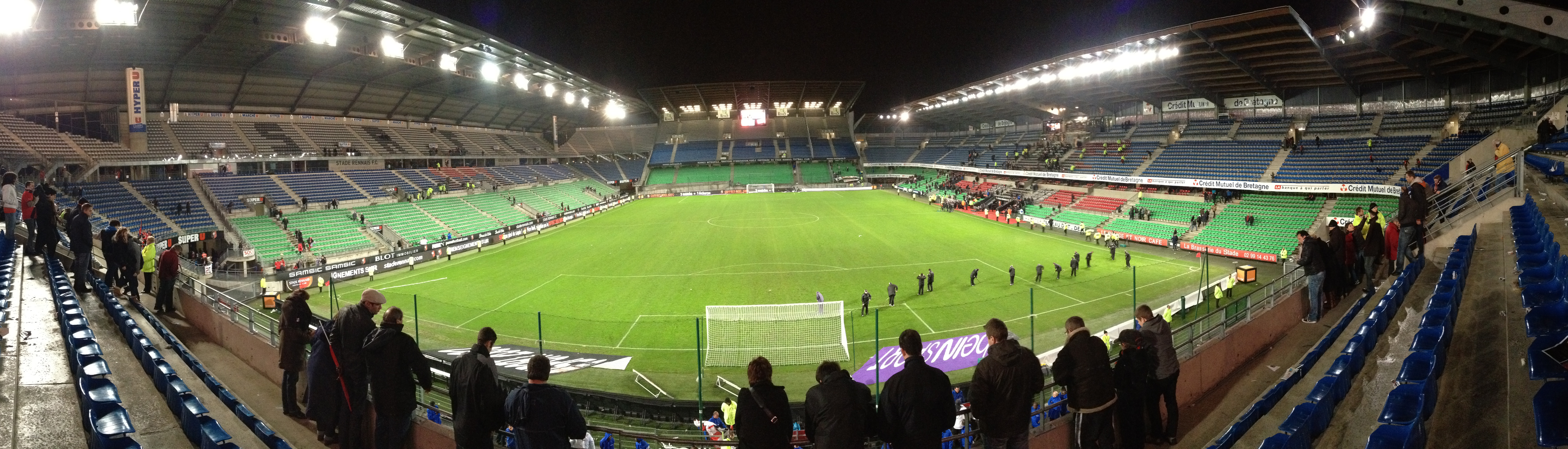 Vue panoramique du stade de la route de Lorient, à Rennes, juste après un match